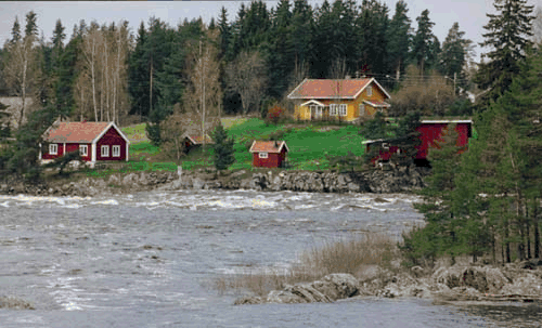 Funnefoss Industriarbeidermuseum, Opakermoen